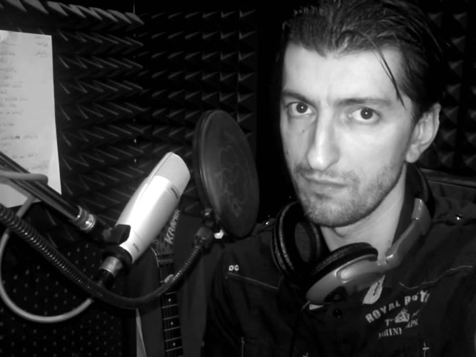 Queryen (Miloš Plank) v roku 2013.